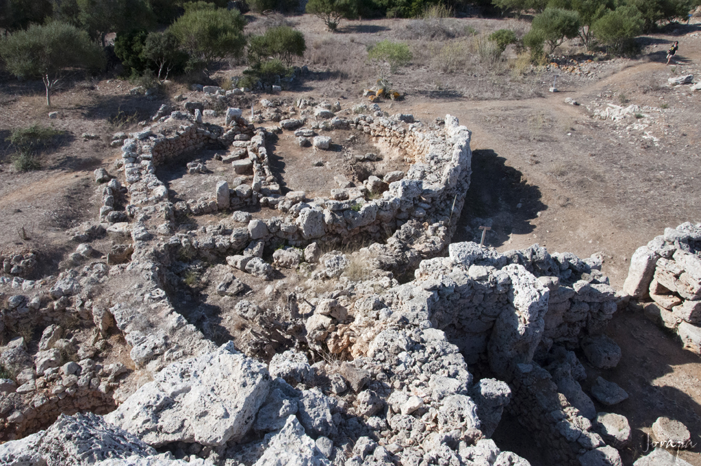 So na Caçana (Alaior)